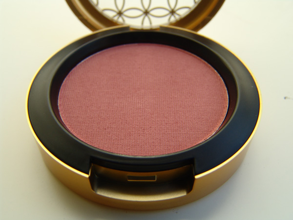 Overprint (Matte)